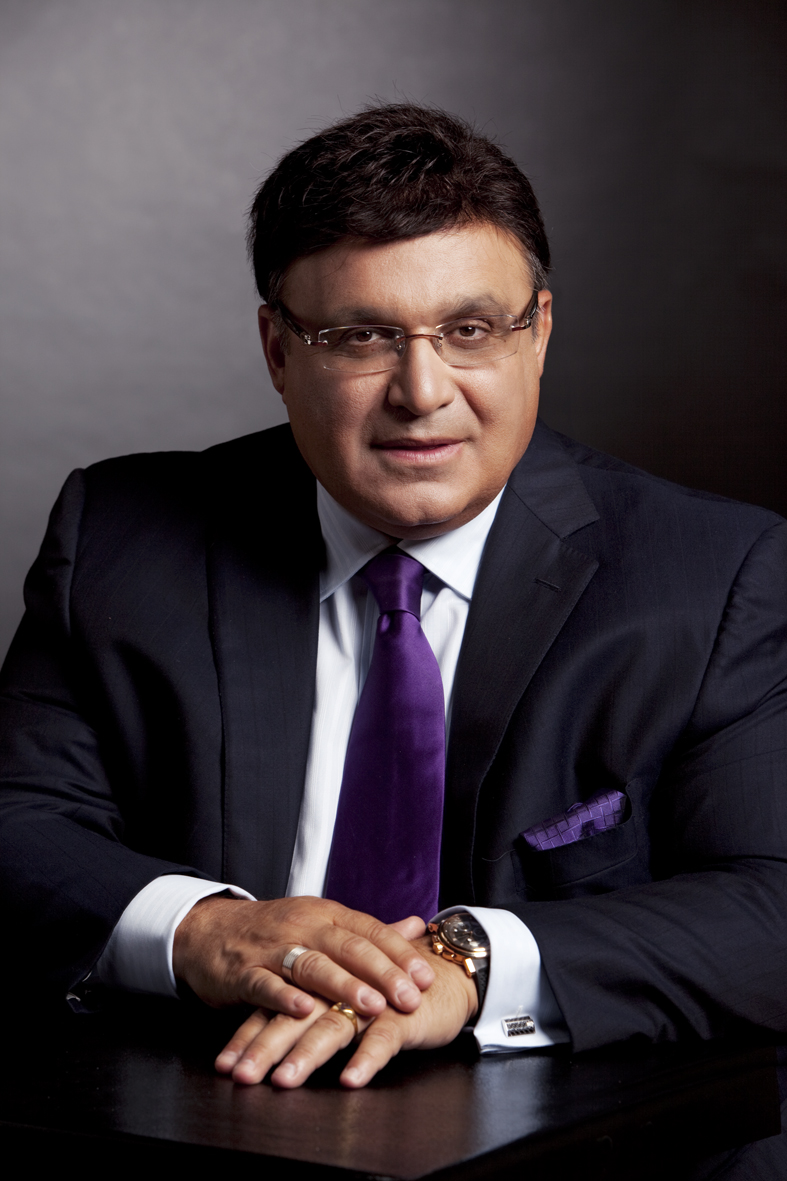 עופר נמרודי